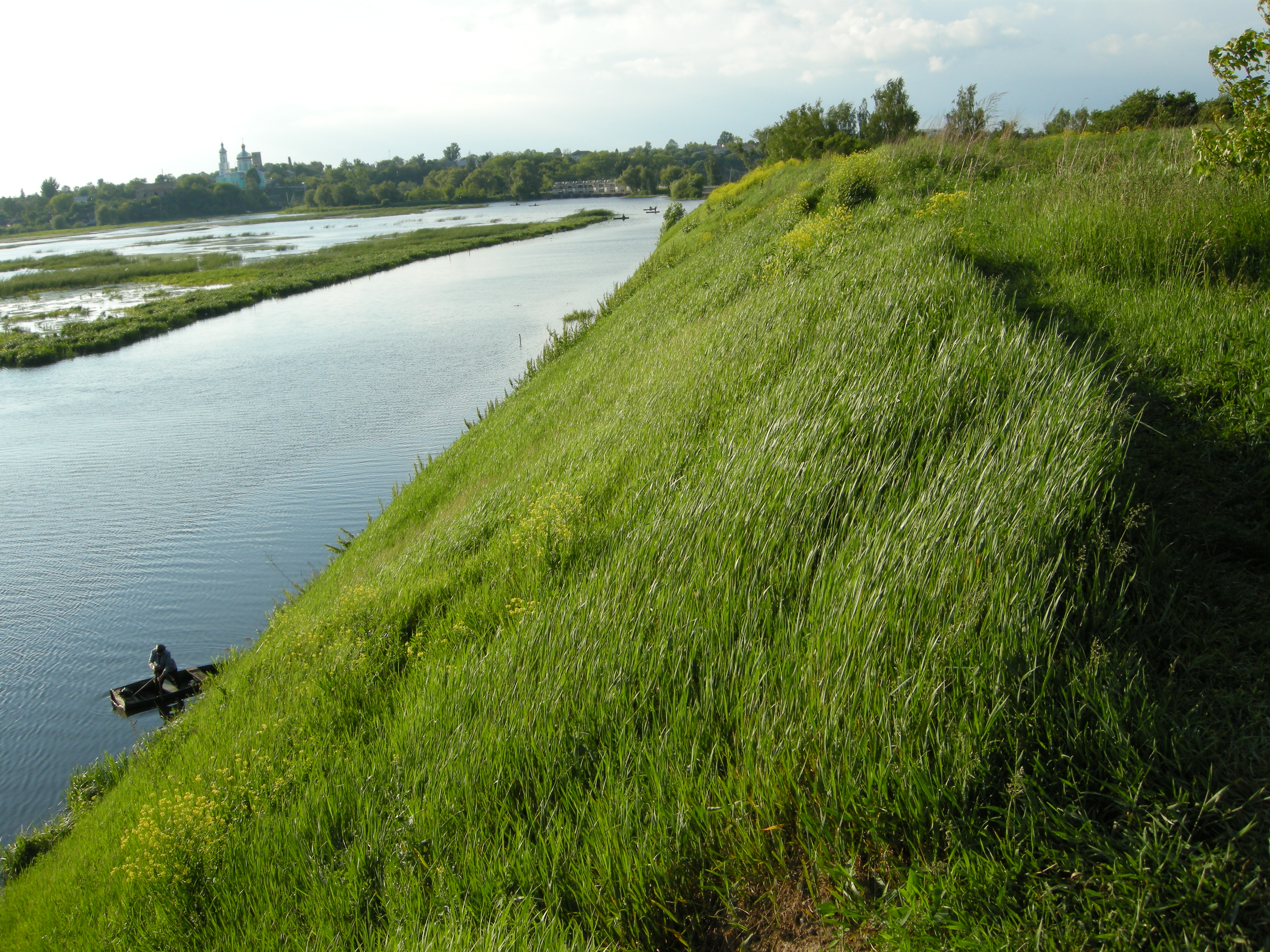 Вал Новозаславського замку від сторони Гориня.